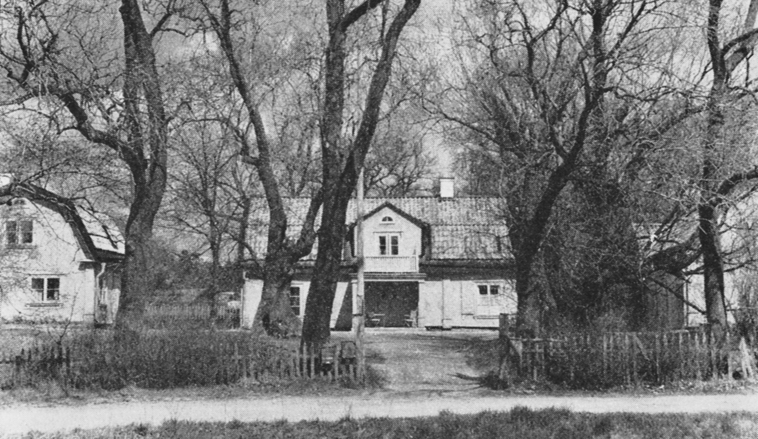 Mörby gård, Danderyd